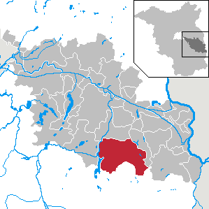 Friedland in Brandenburg (Country) - District Oder-Spree